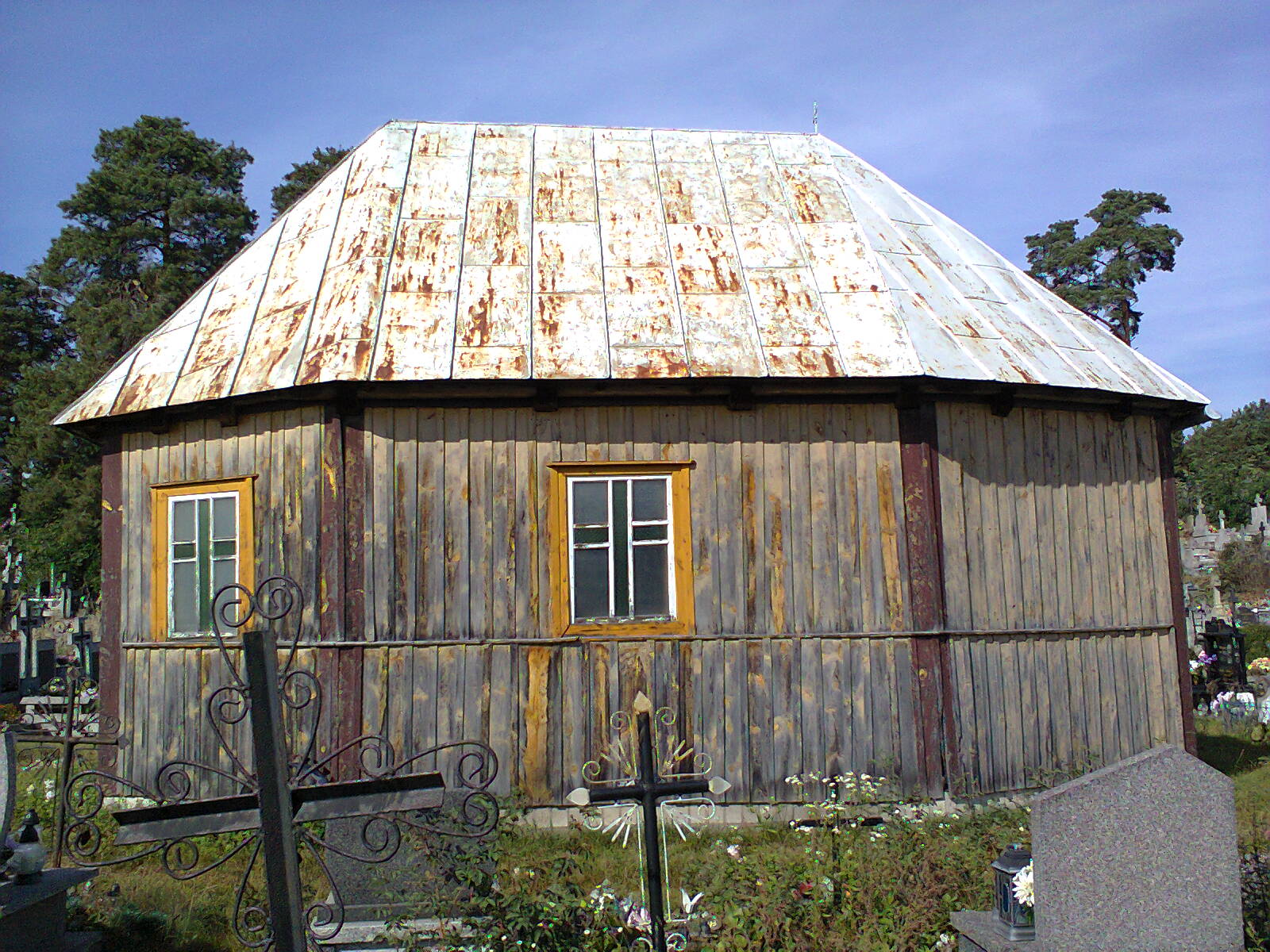 Kaplica cmentarna w Turośli